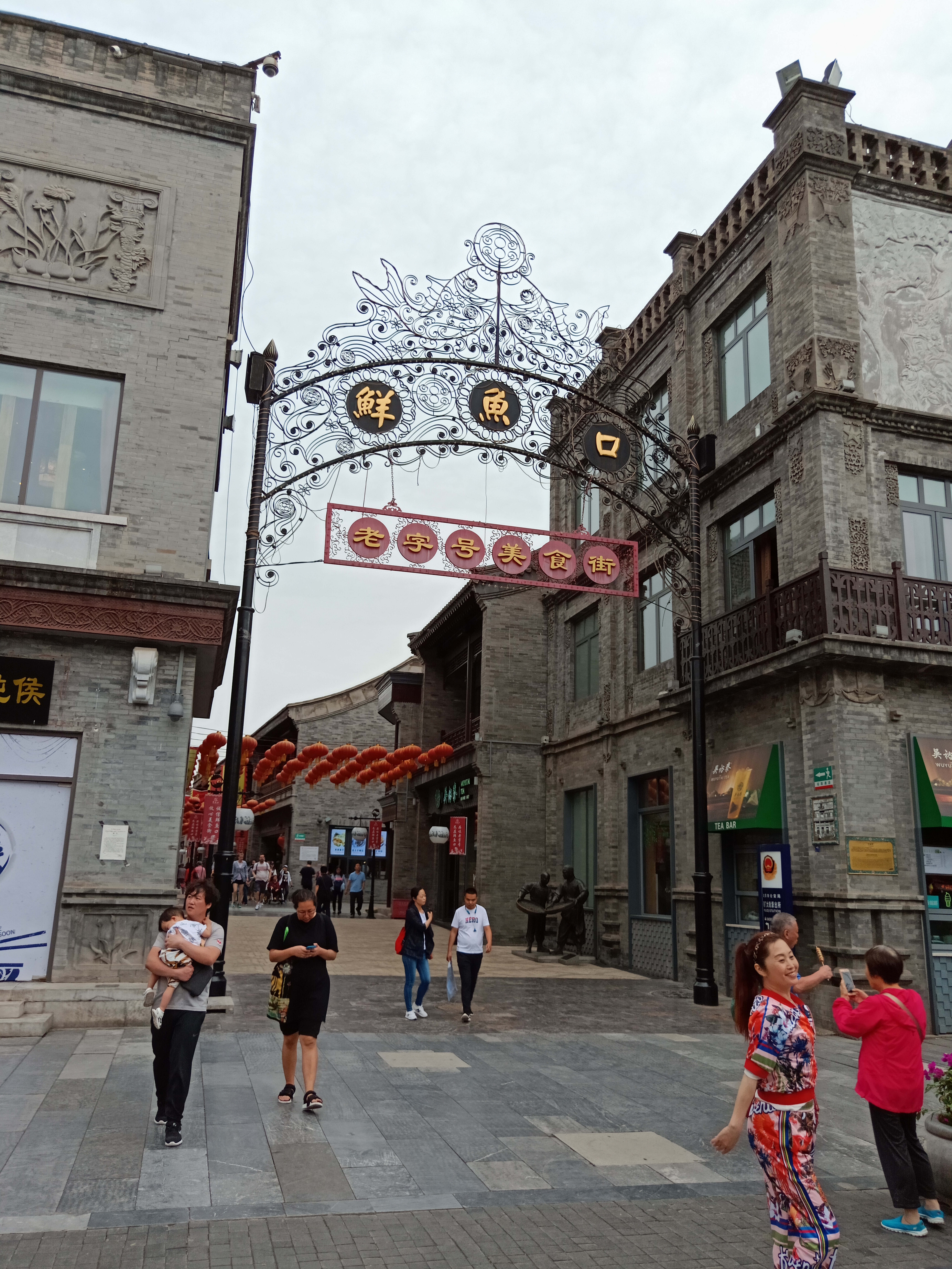 粵語: 北京東城區前門大街鮮魚口